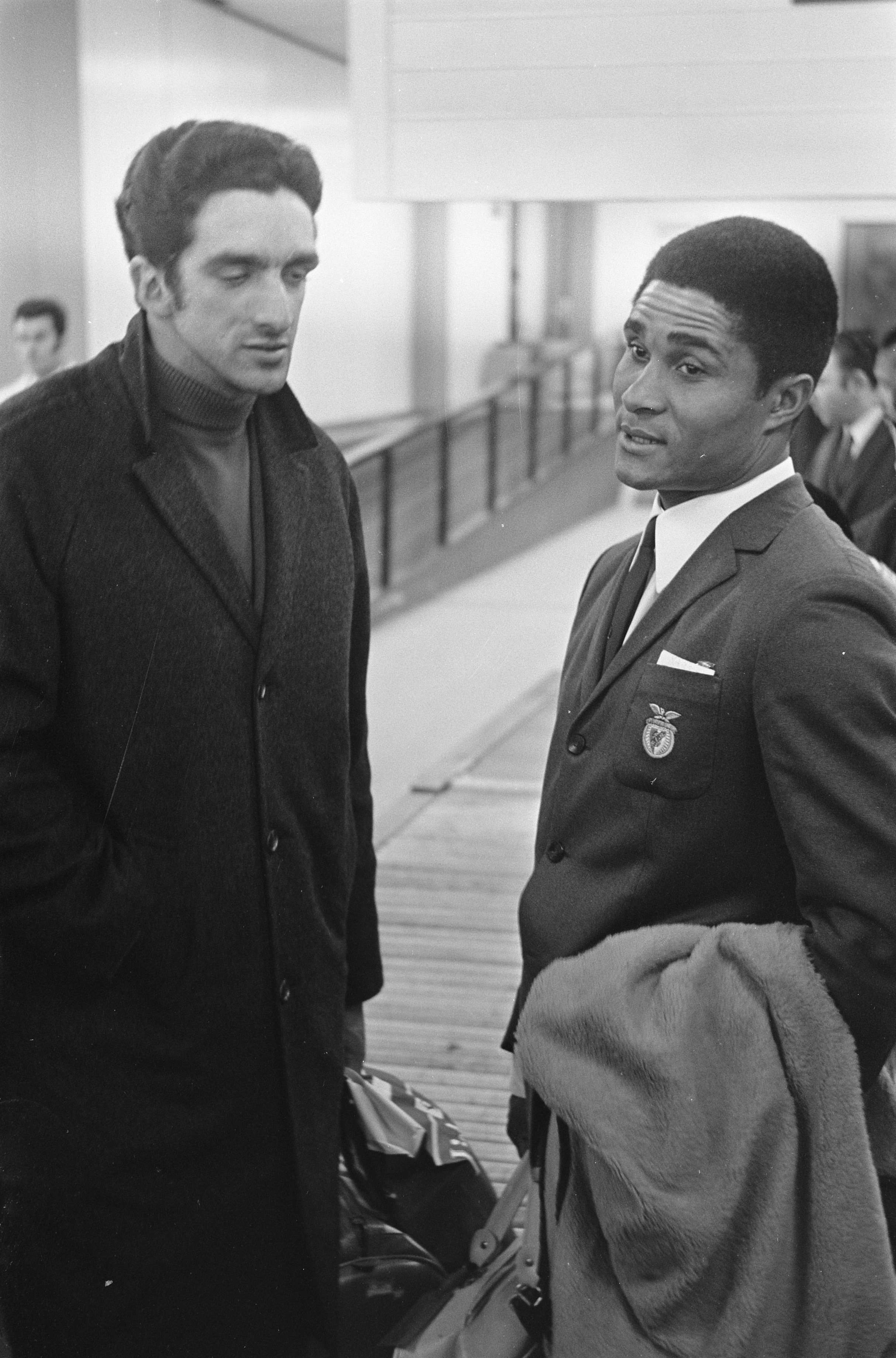 Collectie / Archief : Fotocollectie Anefo Reportage / Serie : [ onbekend ] Beschrijving : Elftal van Benfica arriveert op Schiphol voor Europacup-wedstrijd tegen Ajax. Eusébio (rechts) en Torres Datum : 10 februari 1969 Locatie : Noord-Holland, Schiphol Trefwoorden : elftallen, sport, voetballers Persoonsnaam : Eusebio, Torres, José Augusto Instellingsnaam : Benfica, Europa Cup Fotograaf : Evers, Joost / Anefo Auteursrechthebbende : Nationaal Archief Materiaalsoort : Negatief (zwart/wit) Nummer archiefinventaris : bekijk toegang 2.24.01.05 Bestanddeelnummer : 922-0865